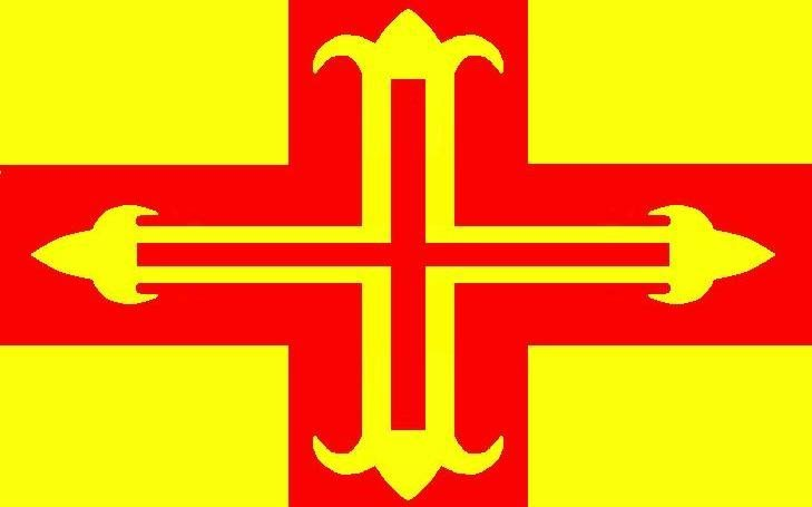 brumado-bahia